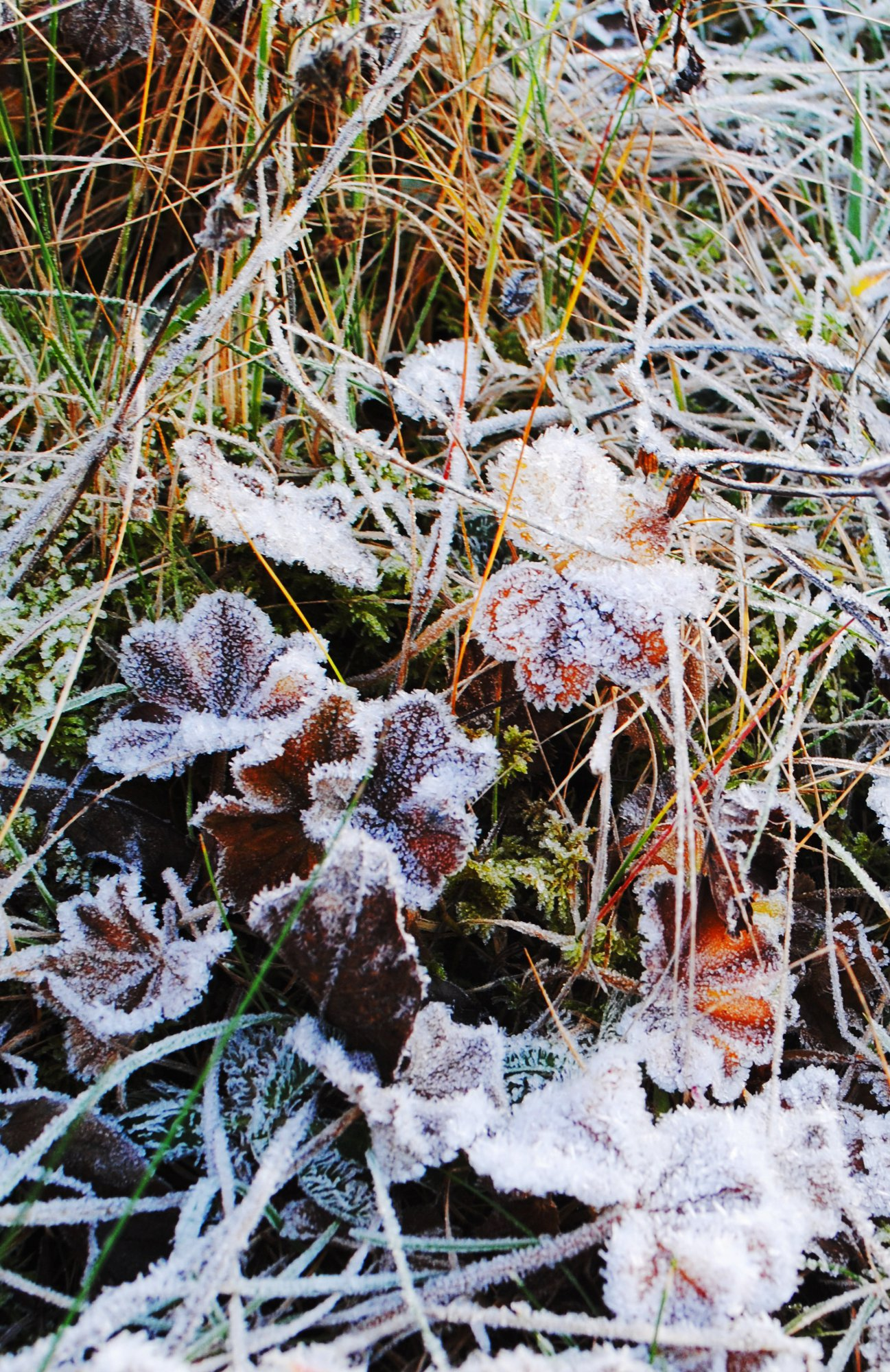 Kortslehe tunneb ära kortsuliste lehtede järgi. Noorelt on need algul kokkuvolditud nagu üks kaunis keskajast pärit lehvik. Päris lamedaks ei muutu lehed ka avanenult. Nii koguneb suvehommikutel sageli kortslehe lehe alumisse ossa iseloomulik kastetilk.